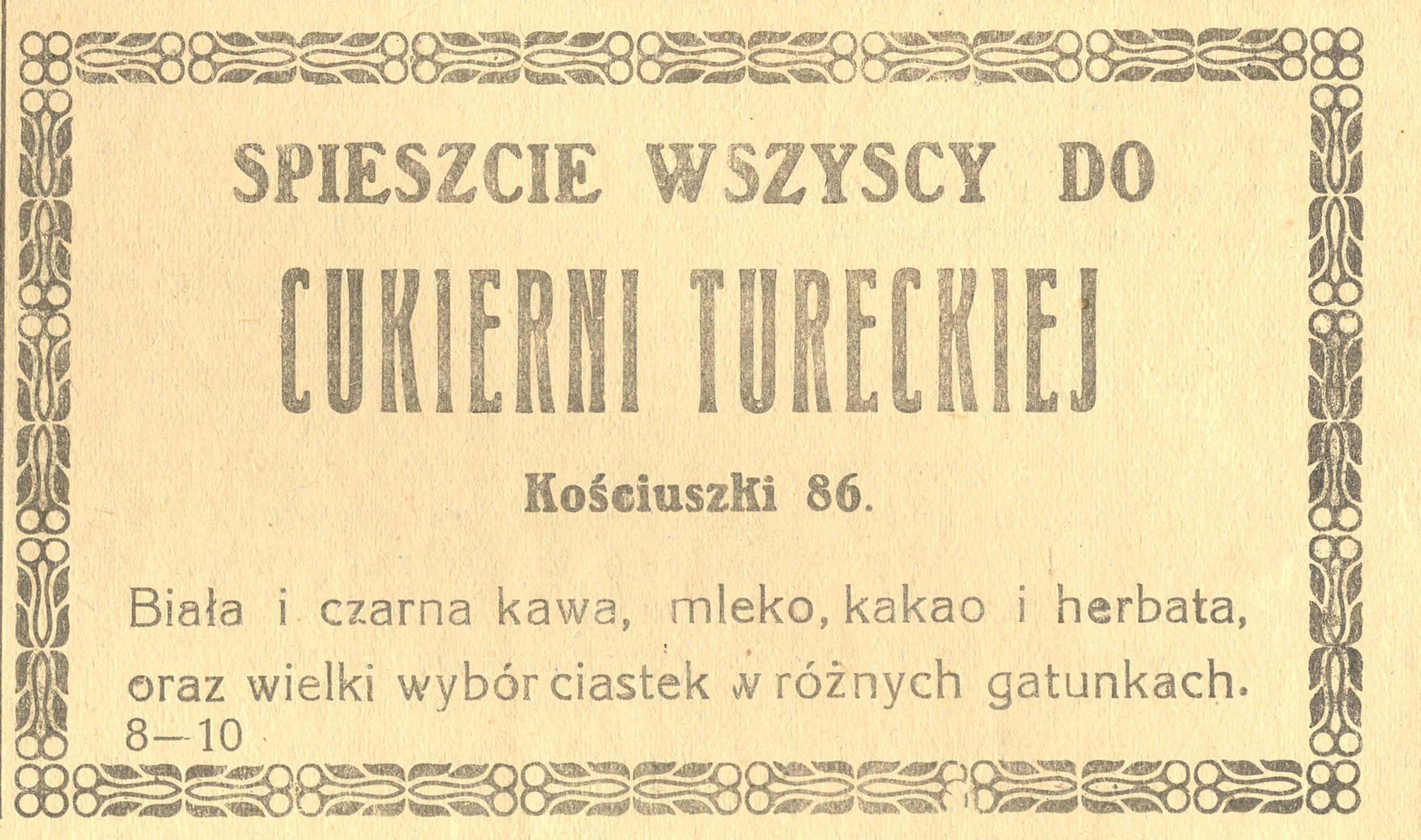 Reklama Cukierni Tureckiej (Suwałki)